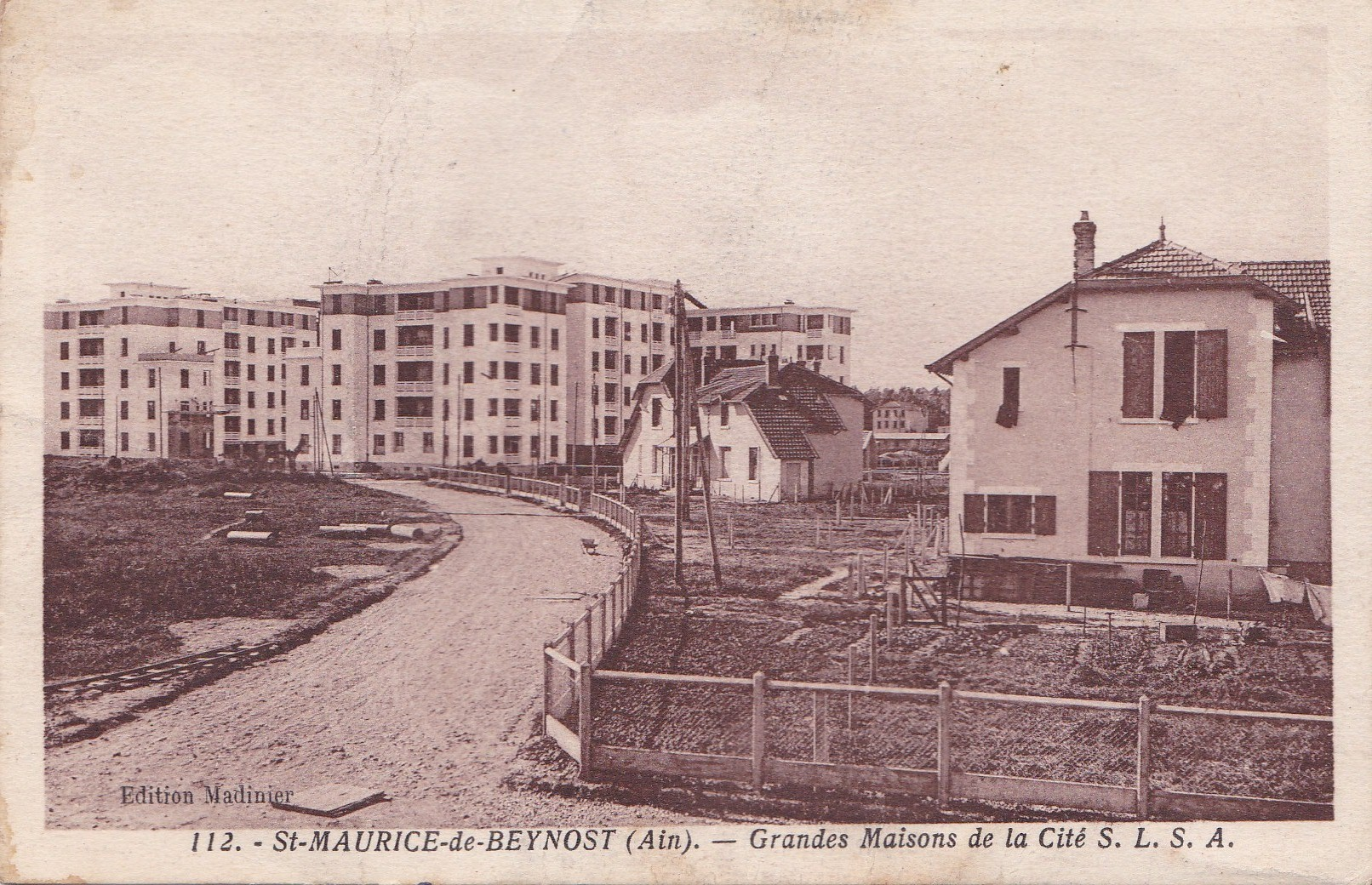 Carte postale - Grandes maisons de la cité de la Société Lyonnaise de Soie Artificielle à Saint-Maurice-de-Beynost.